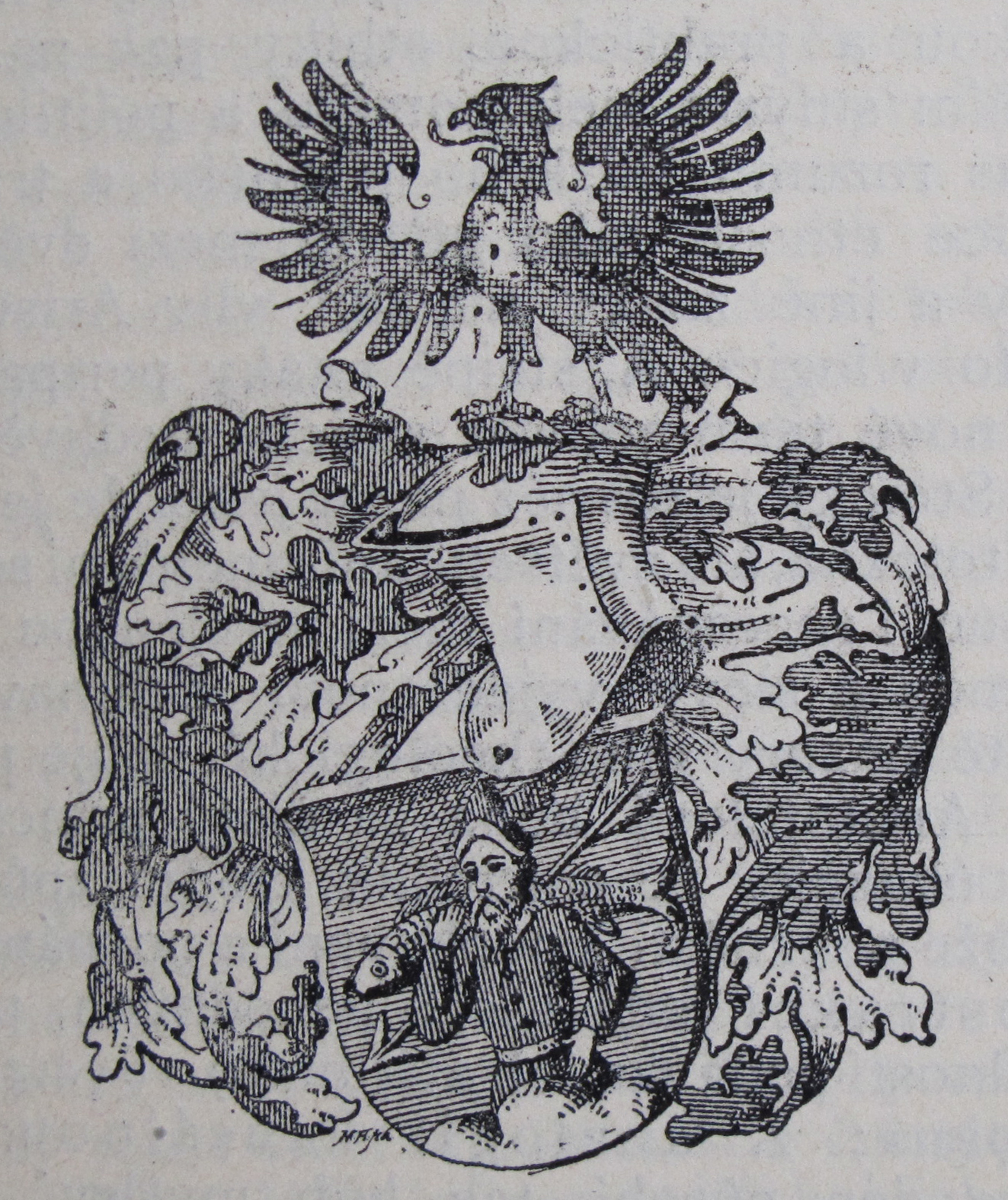 Původní popisek: Č. 149. Znak Albínů z Helfenburka.